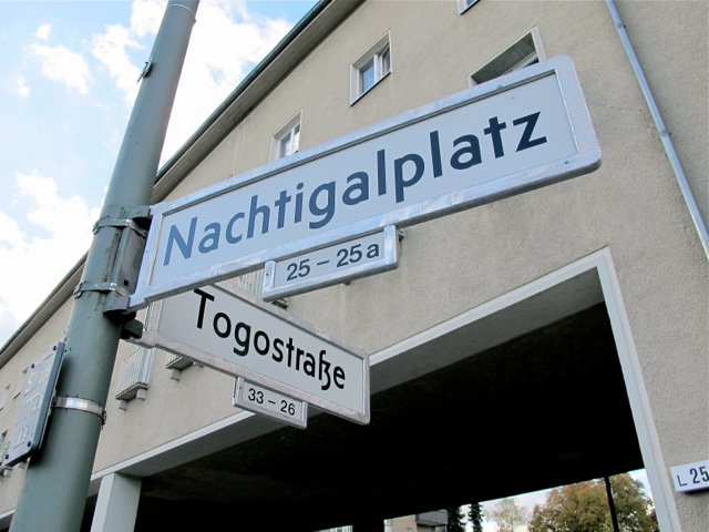 Skylt på Nachtigalplatz i Berlin.